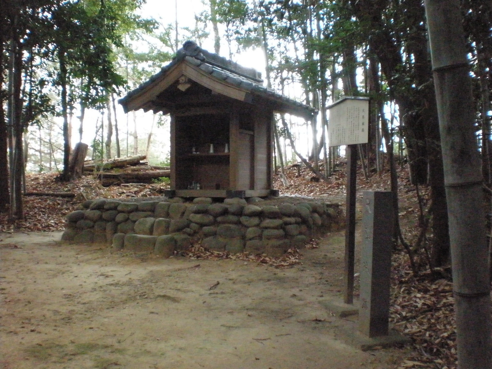 愛知県小牧市にある大草城跡地